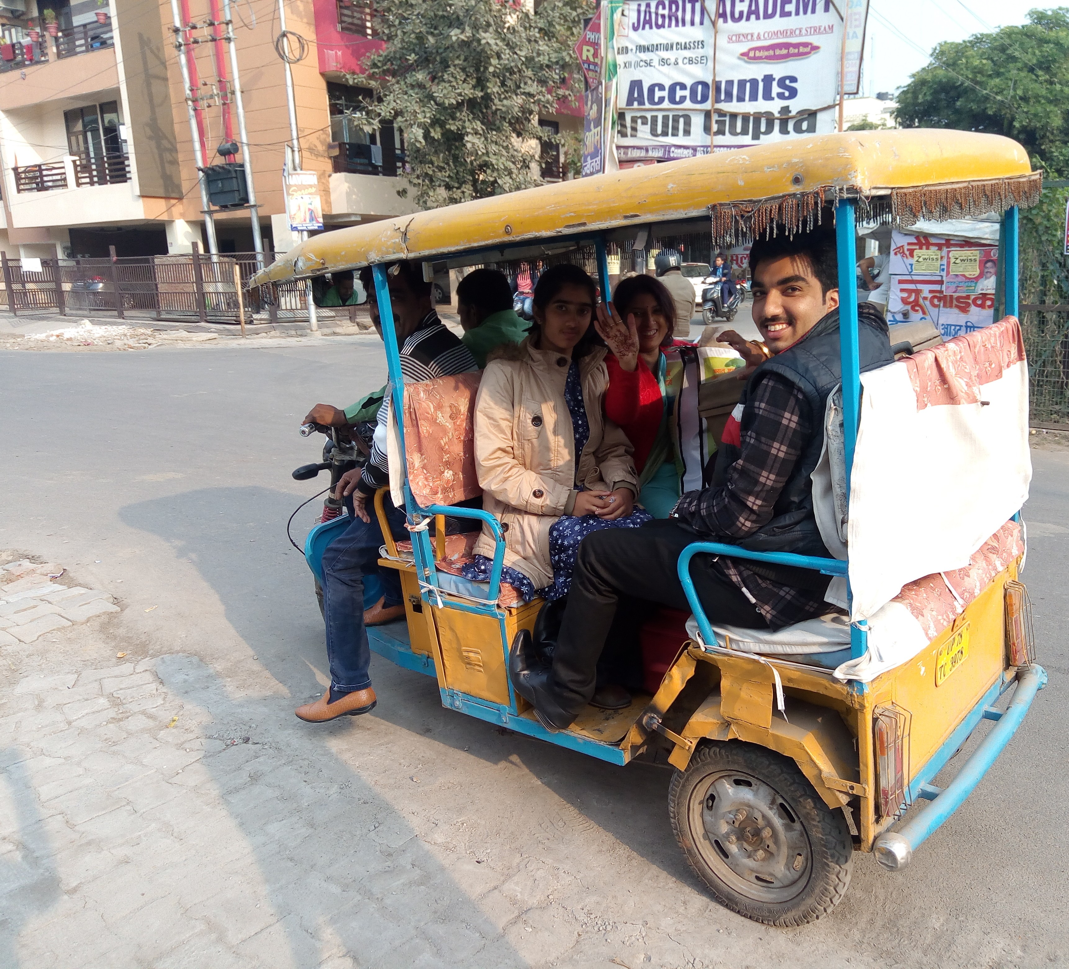 विद्युत वाहन अथवा कि इलेक्ट्रिकल वेहिकल का उपयोग सवारी गाड़ी के रूप में